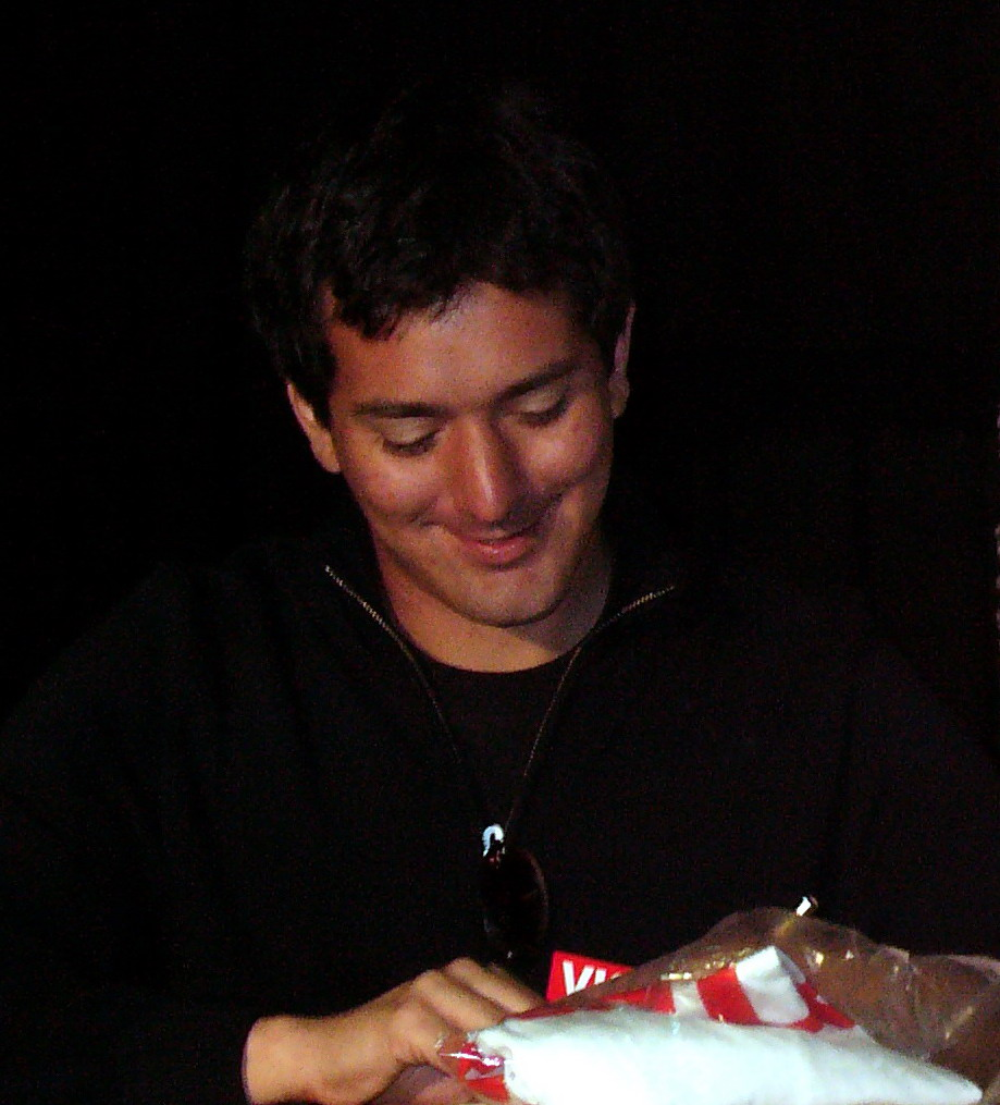 Nombre: Santiago Roncagliolo País de origen: Perú Nacionalidad: Peruana Profesión : Escritor Lugar y fecha de nacimiento : Lima, 29 de marzo de 1975